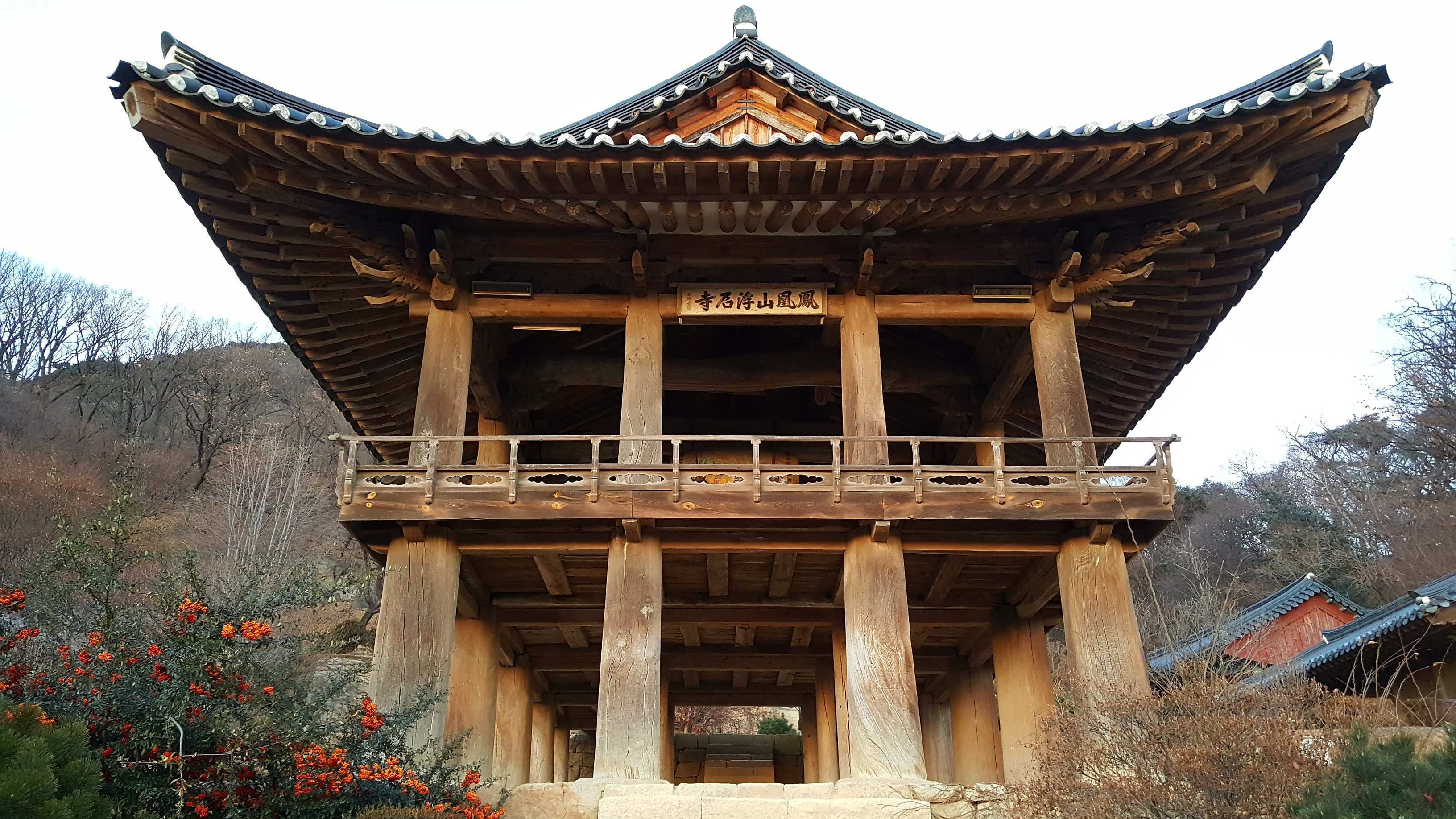 부석사 범종루